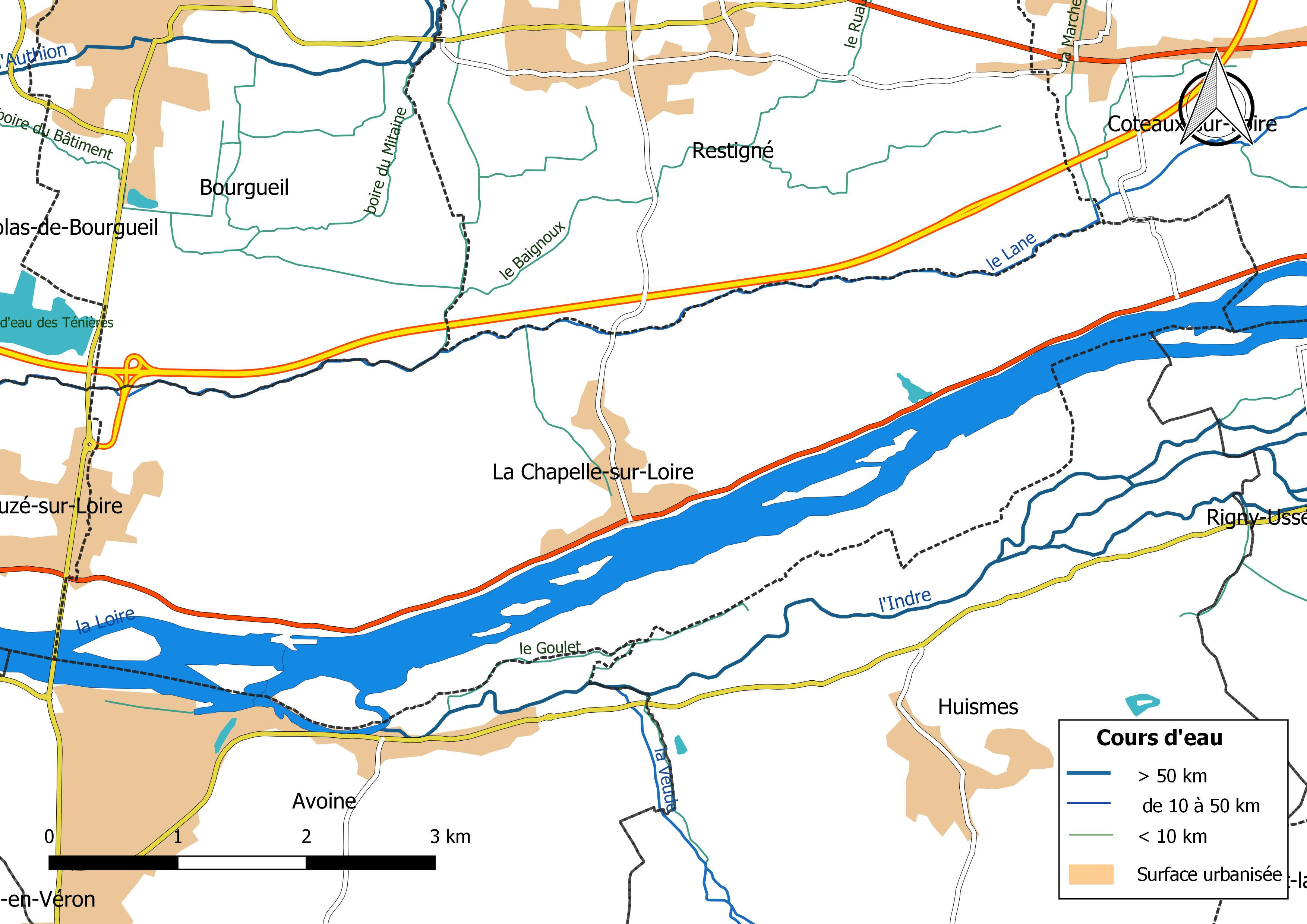 Carte du réseau hydrographique de la commune de La Chapelle-sur-Loire (France).